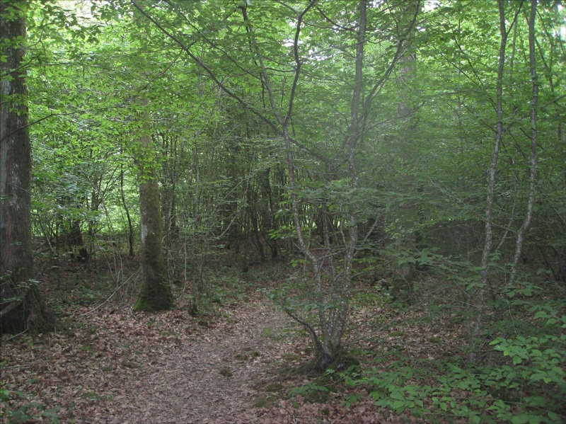 Le sentier du martin pécheur, à Bazolles